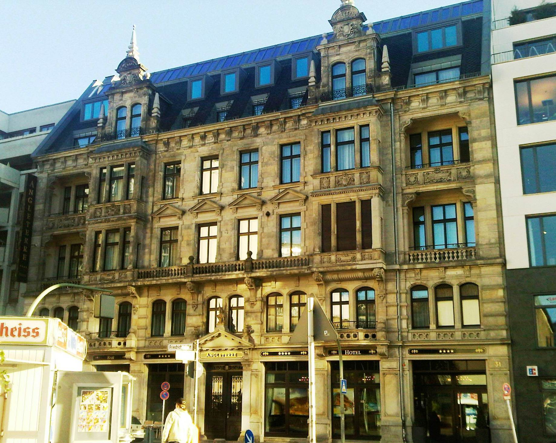 Geschäftshaus der Baseler Feuerversicherungs-Gesellschaft in der Friedrichstraße 31 im Berliner Ortsteil Kreuzberg. Das Gebäude steht unter Denkmalschutz und beherbergt heute ein Hotel.